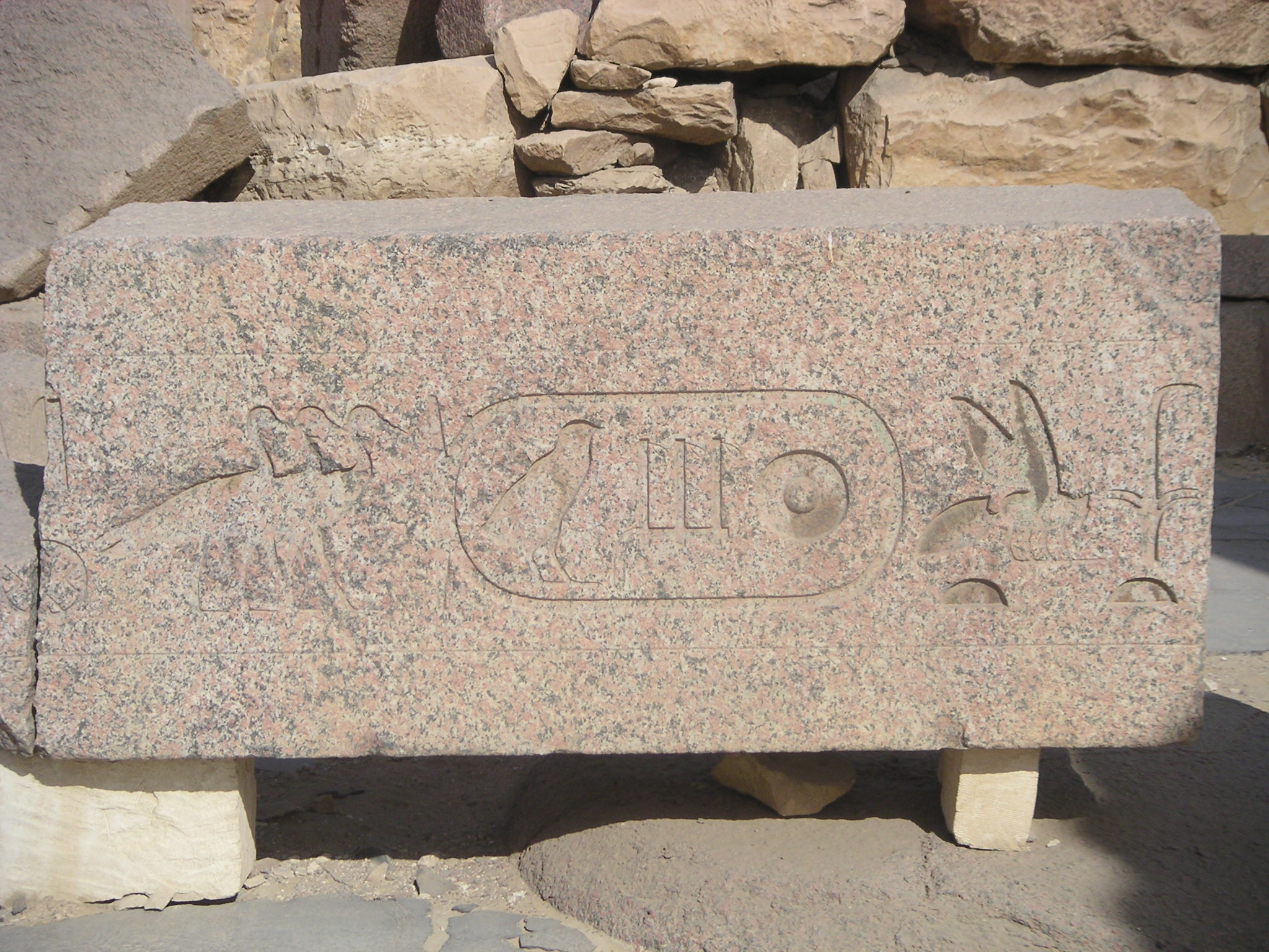 Architrave de la cour du temple haut du complexe pyramidale de Sahourê portant son cartouche - Ve dynastie - Ancien Empire - Abousir